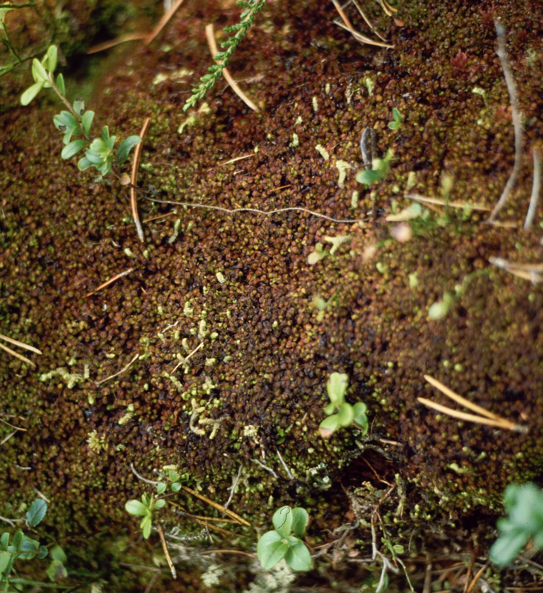 Mylia taylorii, Myliaceae - Österreich/Austria/Autriche: Tirol, Fernpass, Südwestufer des Blindsees